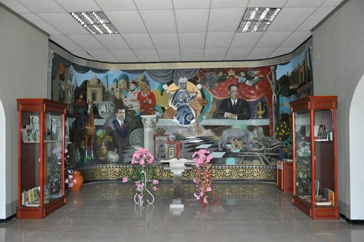 Музей академика Бободжана Гафурова г. Гафуров, Согдийская область, Таджикистан.Тоҷикӣ: Осорхонаи академик Б. Ғафуров. ш. Ғафуров, вилояти Суғд,Тоҷикистон